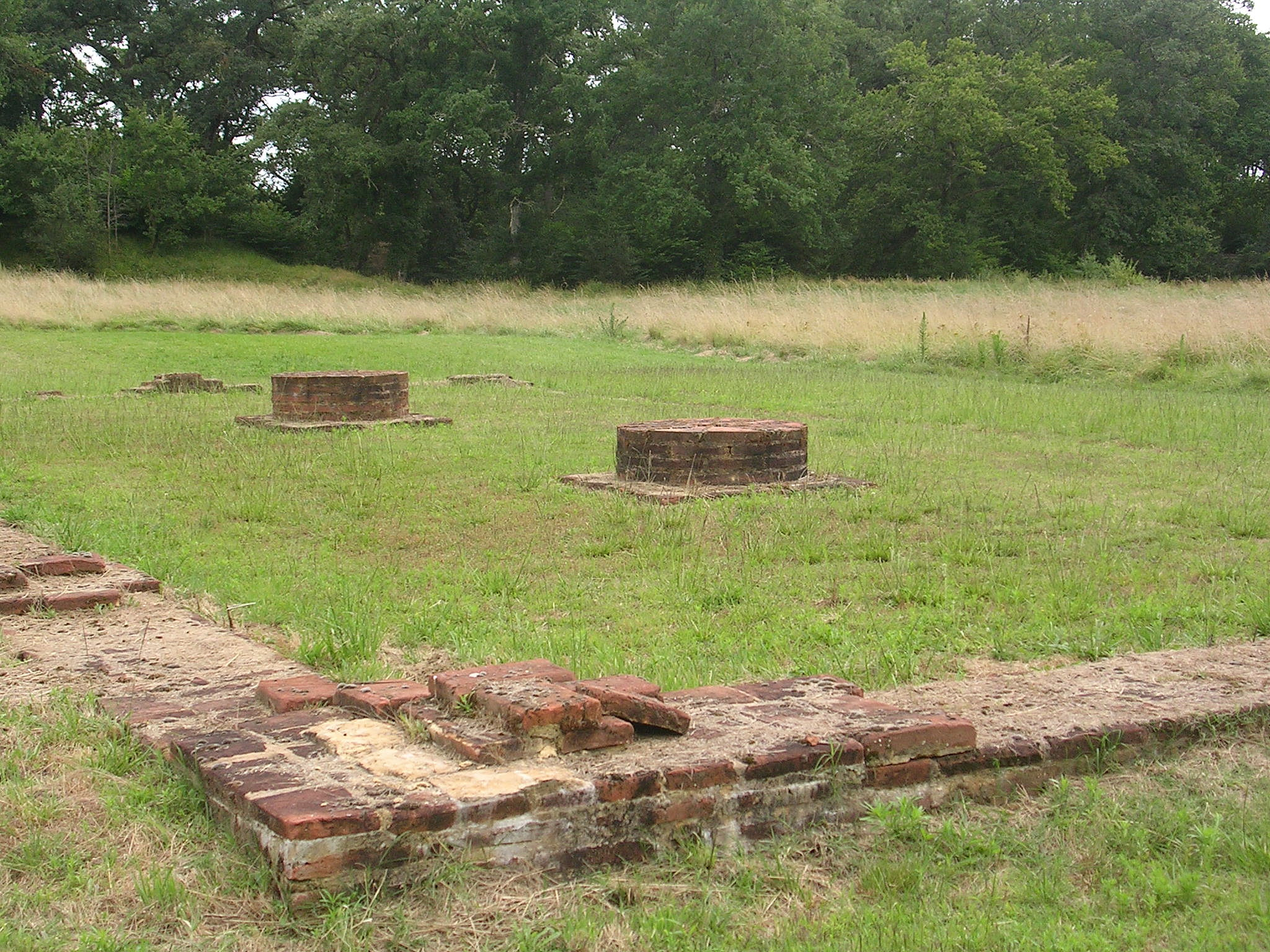 Vestiges du château de Labrit (sur motte féodale)